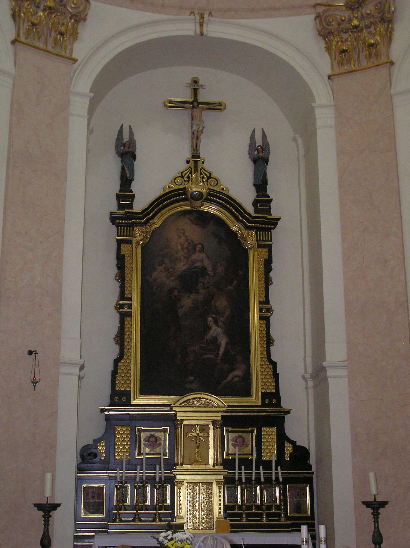 Hlavní oltář v kostele svatého Rocha (Žižkov); Altar in Church of st. Roch, Prague (Žižkov)